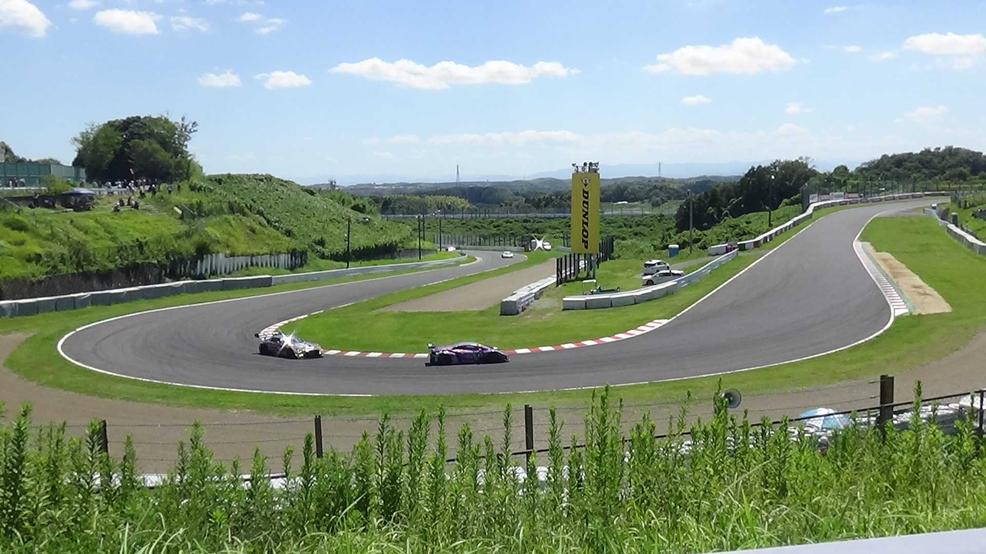 鈴鹿サーキット ヘアピンカーブ